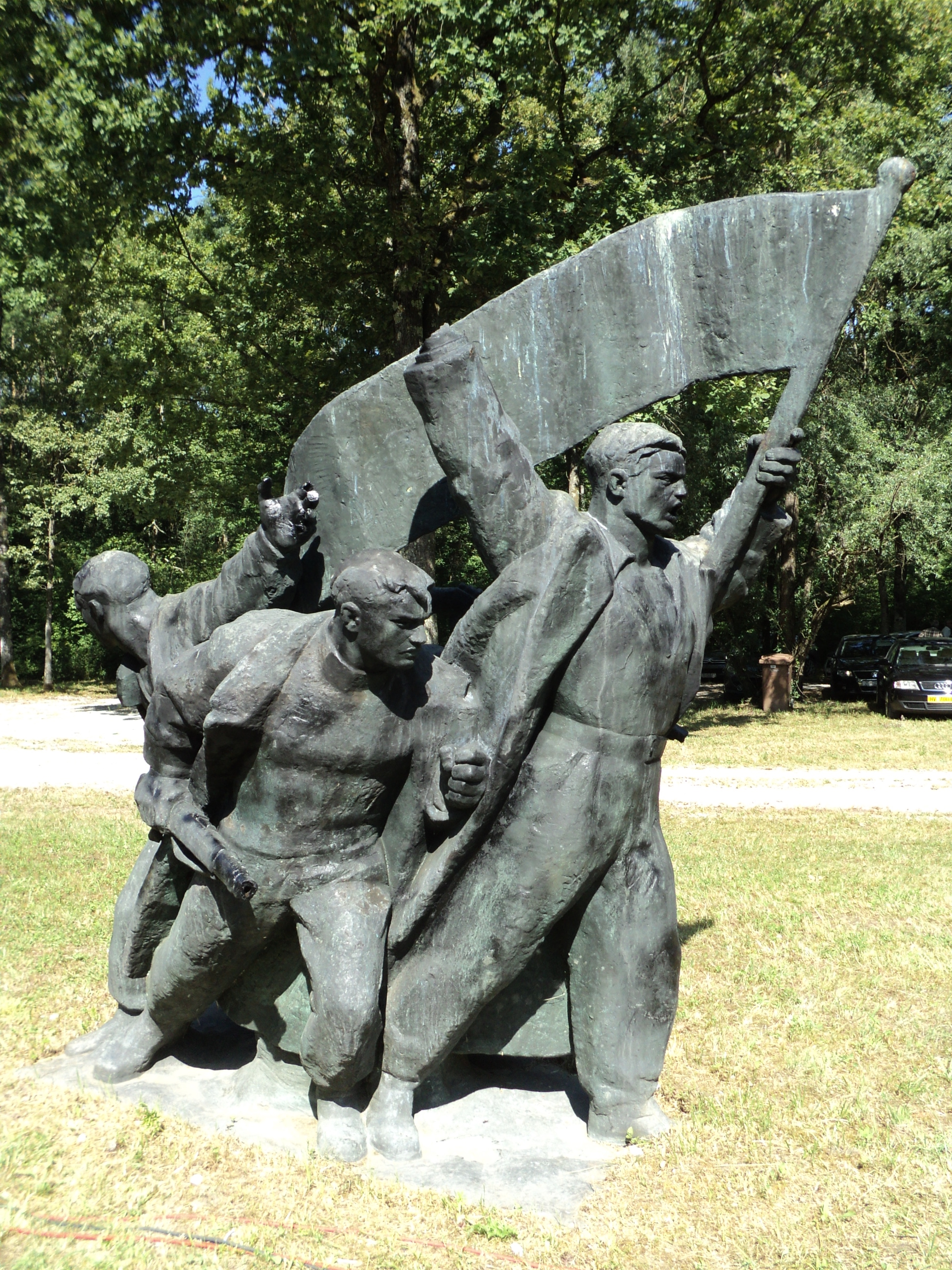 Spomenik Ustanku u šumi Brezovici kod Siska, oštećen. Self-made. Jun 2011.